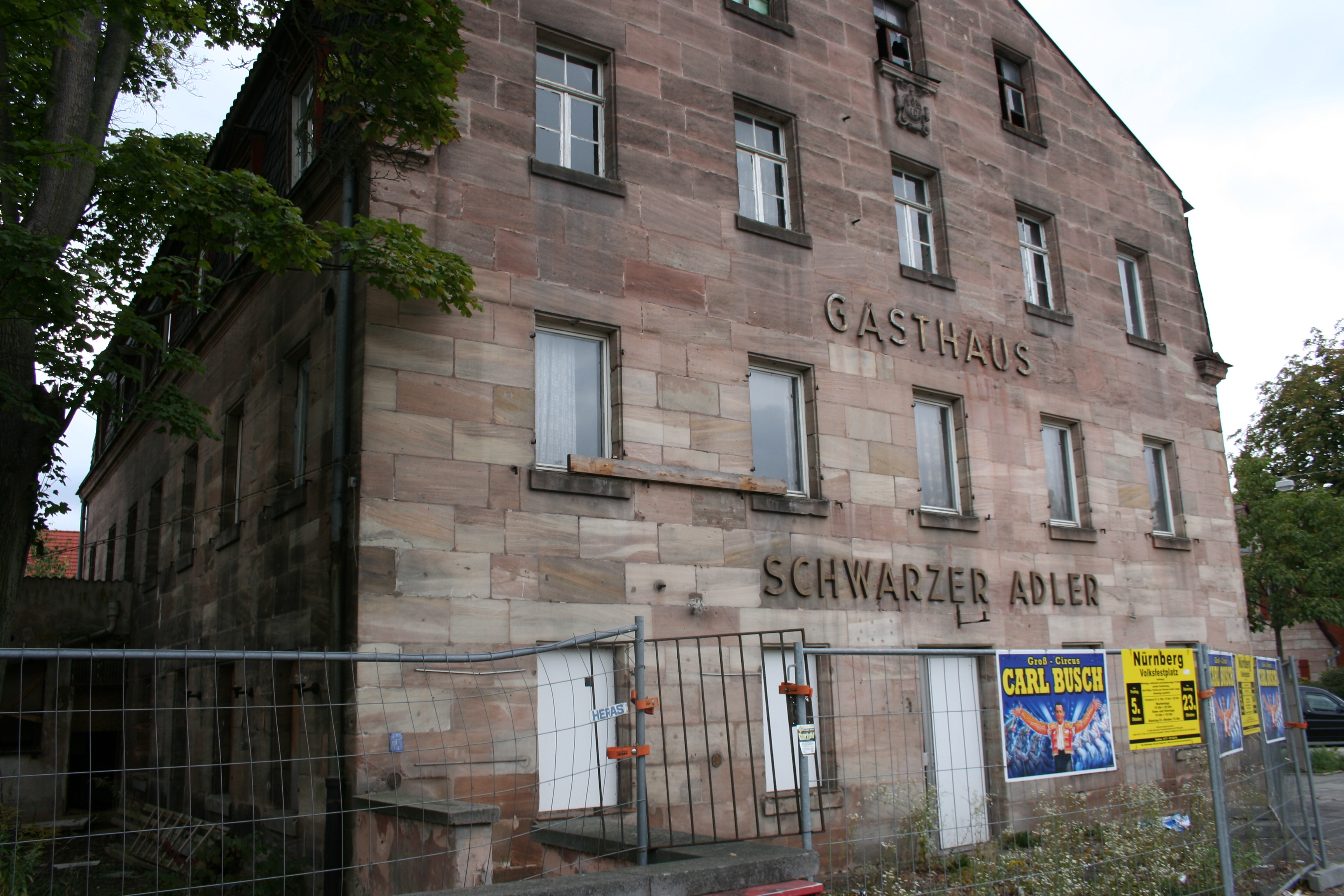 Gasthaus, zweigeschossiger Sandsteinquaderbau mit Mansardgiebeldach, im Kern 17./18. Jahrhundert, dendro.dat. 1616, Umbau und Mansarddachausbau von Johann Carl, 1891, bez. 1892